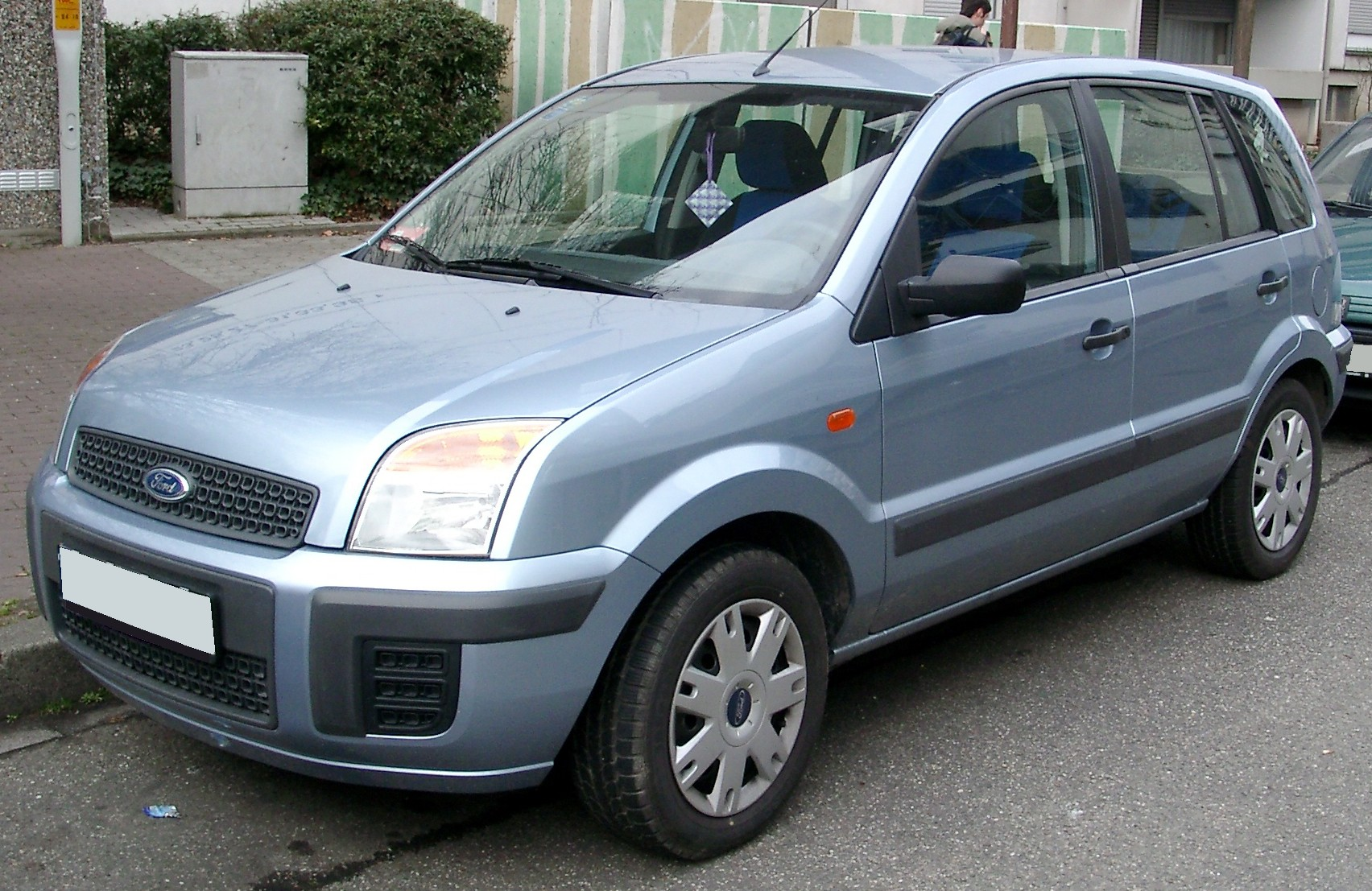 Ford Fusion, Europäische Version